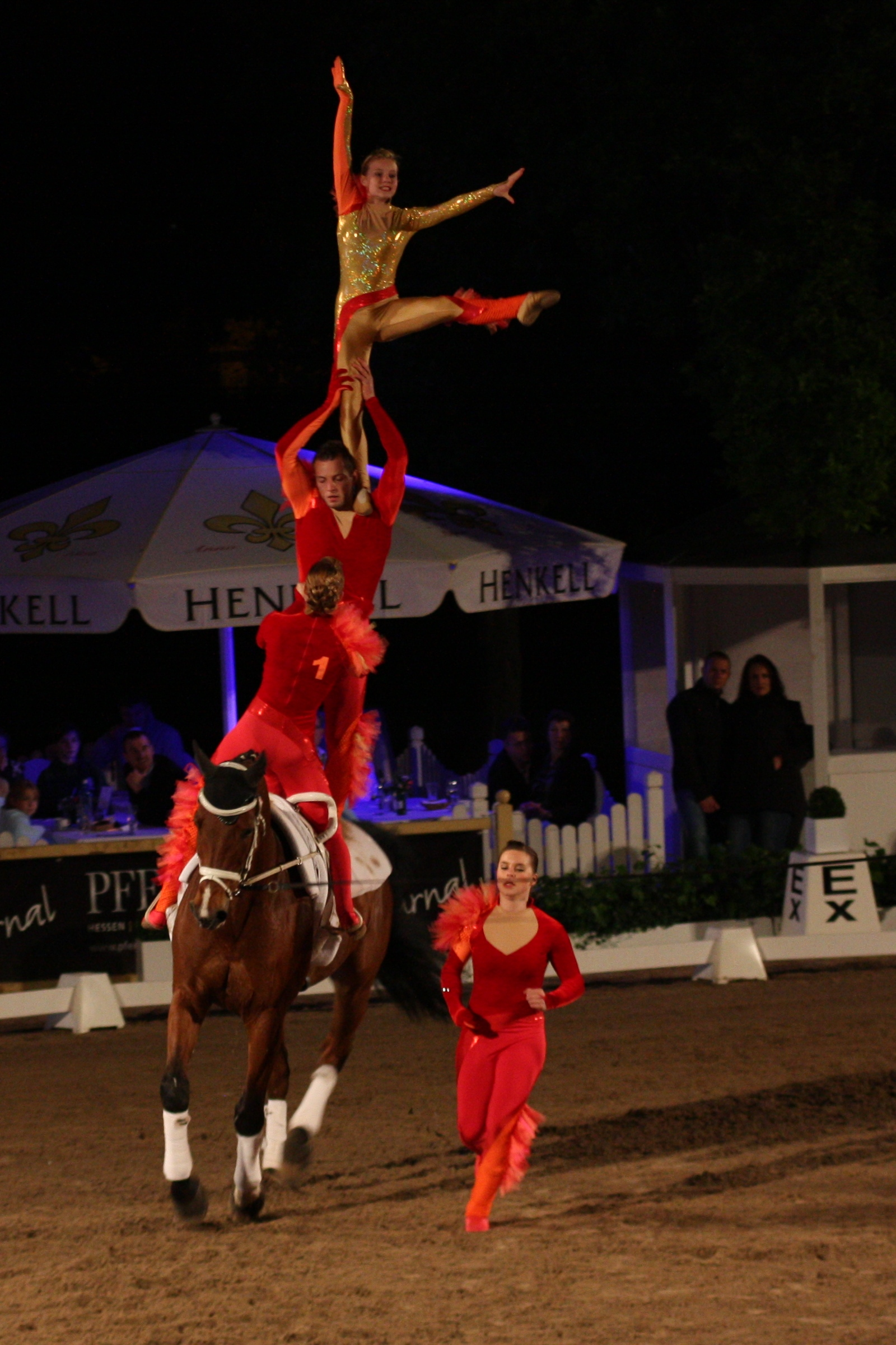 77. Internationales Pfingstturnier Wiesbaden 2013, CVI *** Voltigieren, VV Ingelsberg I mit Lazio 9 Personality rights warning Although this work is freely licensed or in the public domain, the person(s) shown may have rights that legally restrict certain re-uses unless those depicted consent to such uses. In these cases, a model release or other evidence of consent could protect you from infringement claims.